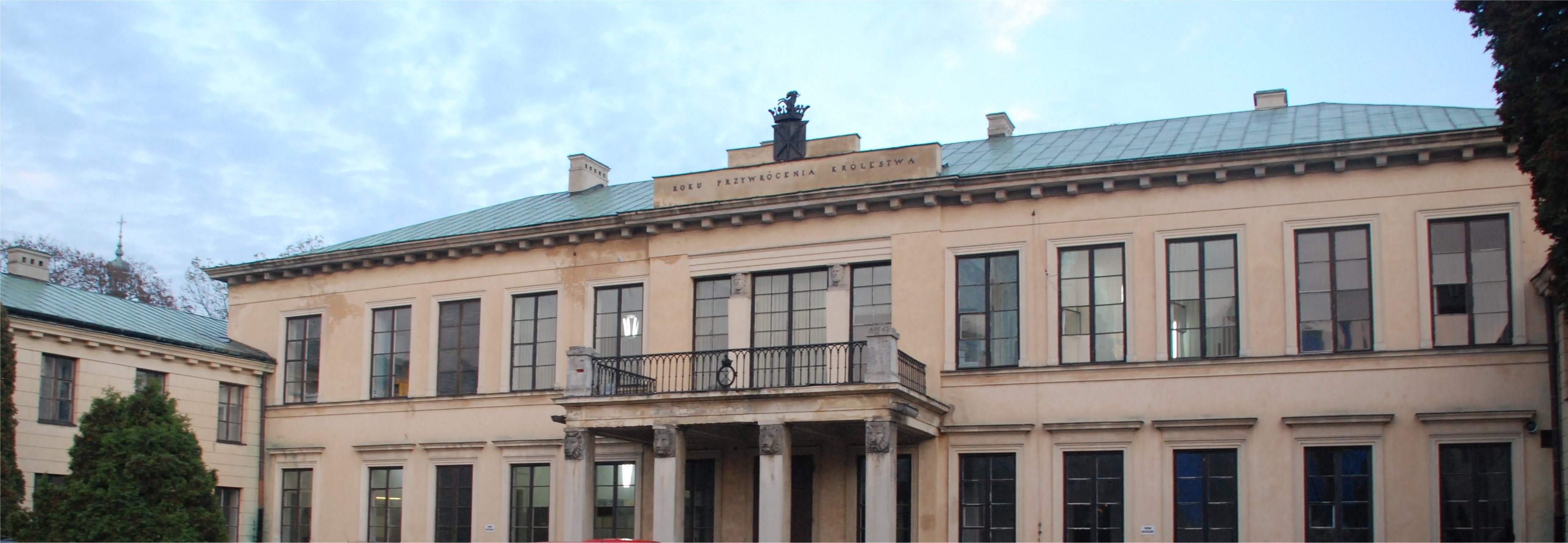 Pałac Błękitny przy ul. Senatorskiej 37 w Warszawie (fot Zu)